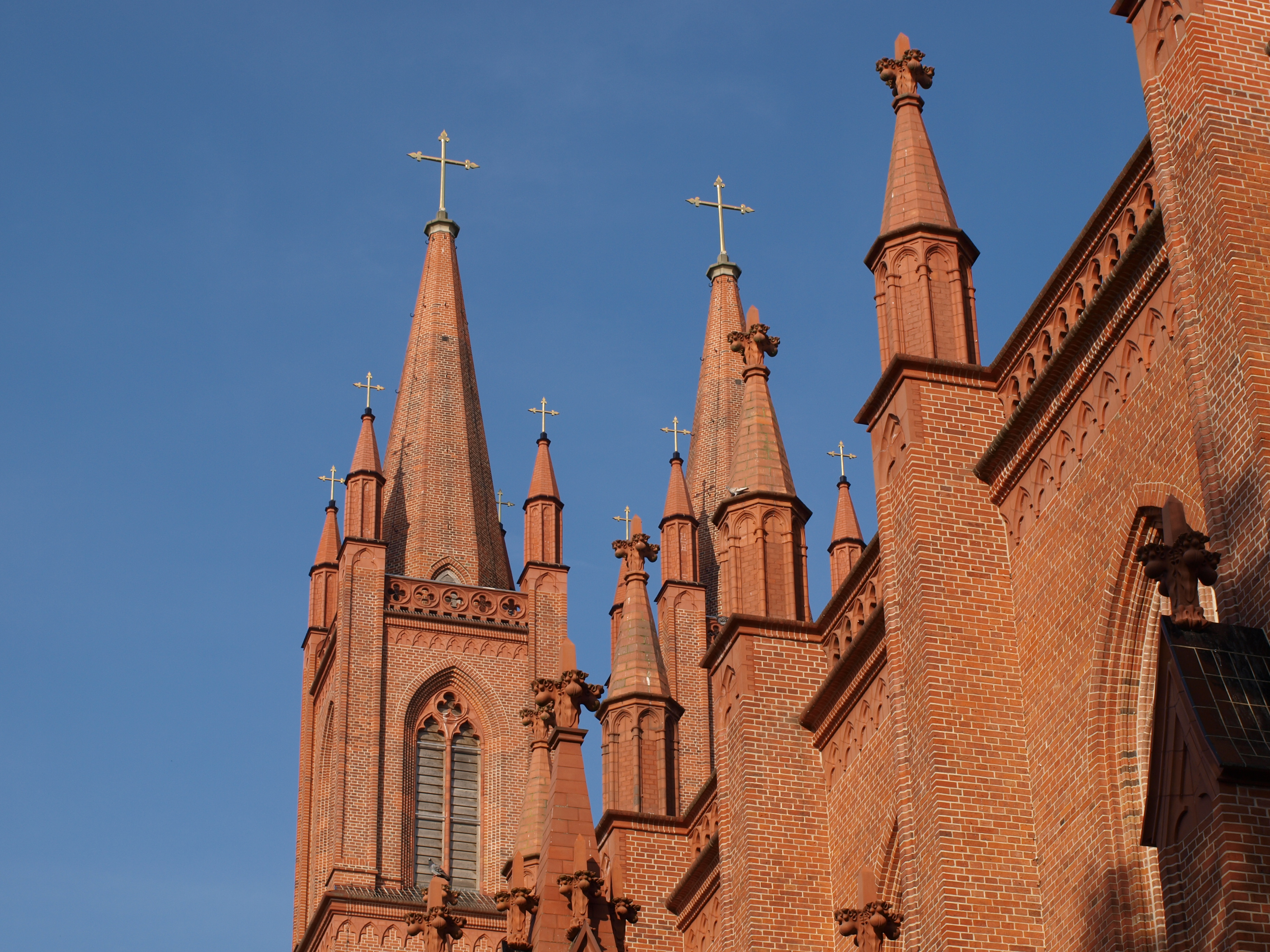 Klosterkirche Dobbertin